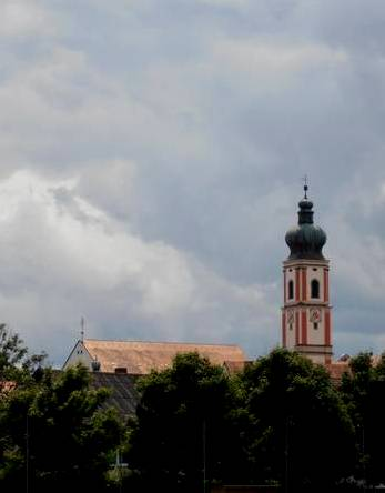 Kirchturm von St. Pankrazius in Roding und Dach der Kirche